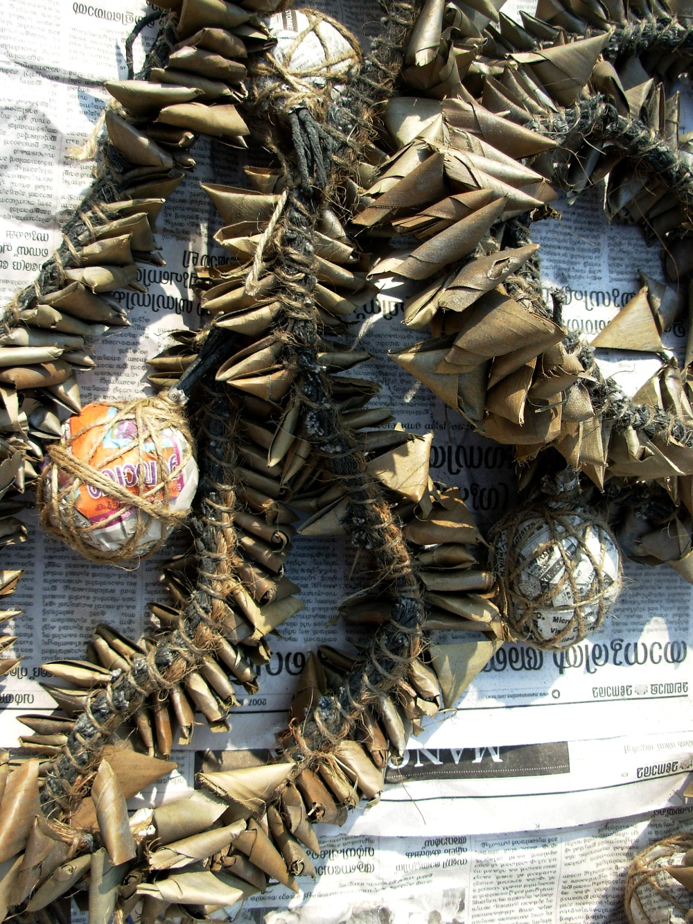 ഓലപ്പടക്കവും ഗുണ്ടും കെട്ടിയ മാലപ്പടക്കം